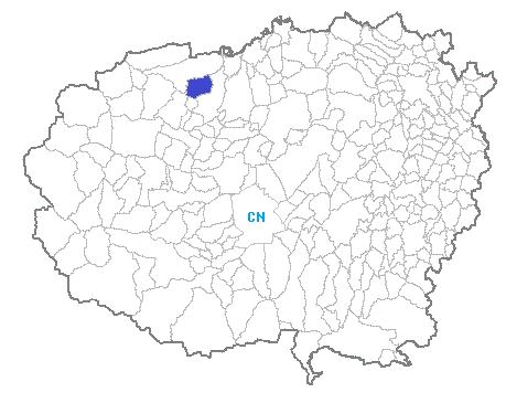 Posizione del comune nella provincia di Cuneo